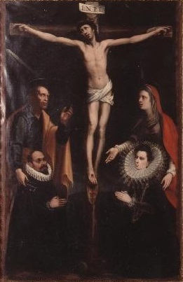 La obra representa a Cristo crucificado junto al apóstol San Pedro, María Magdalena, y los donantes de la obra.